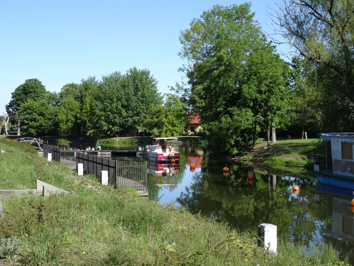 Marina Gwiazda na Kanale Bydgoskim przy ul. Bronikowskiego w Bydgoszczy